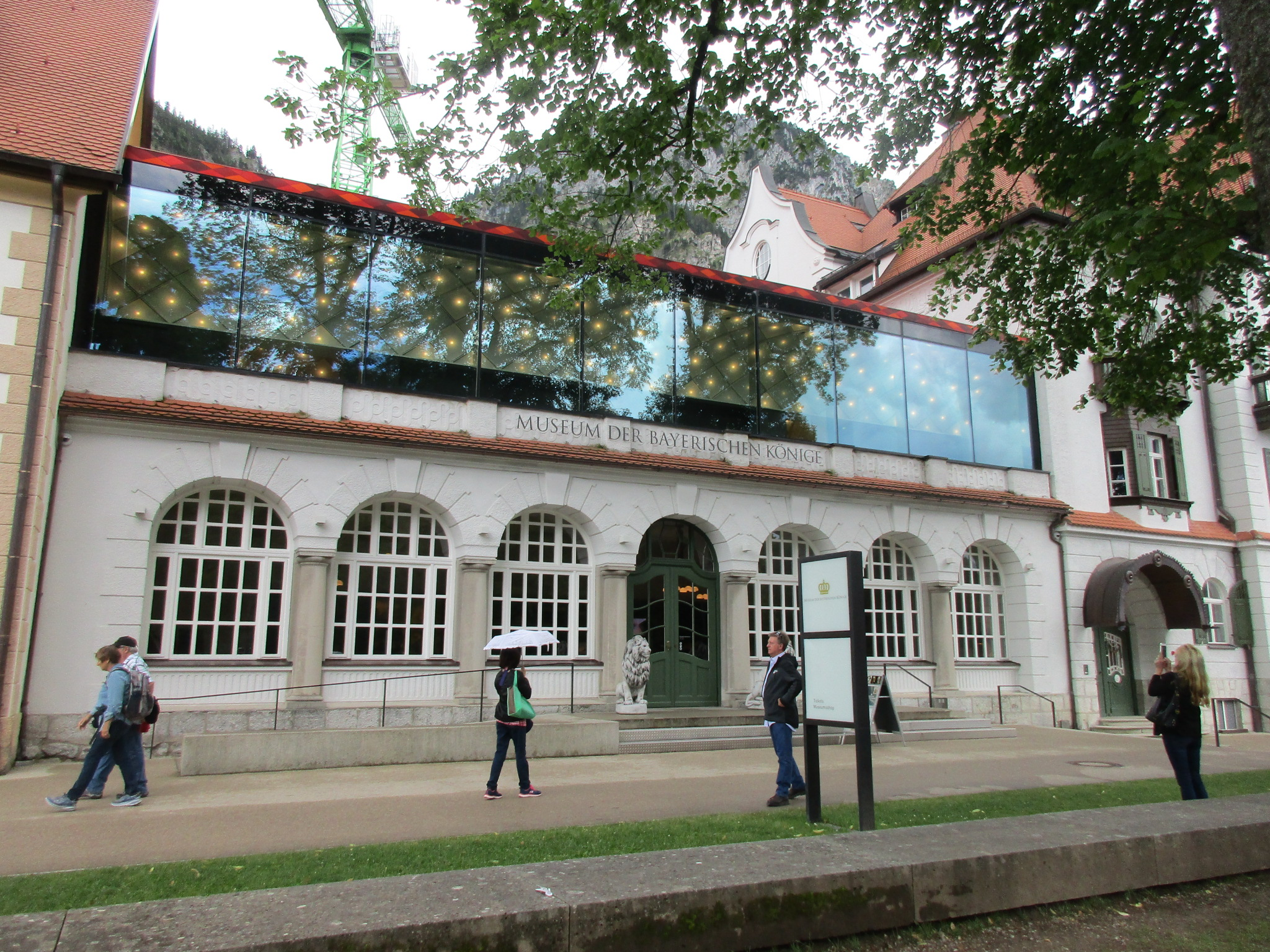 Museum der bayerischen Könige